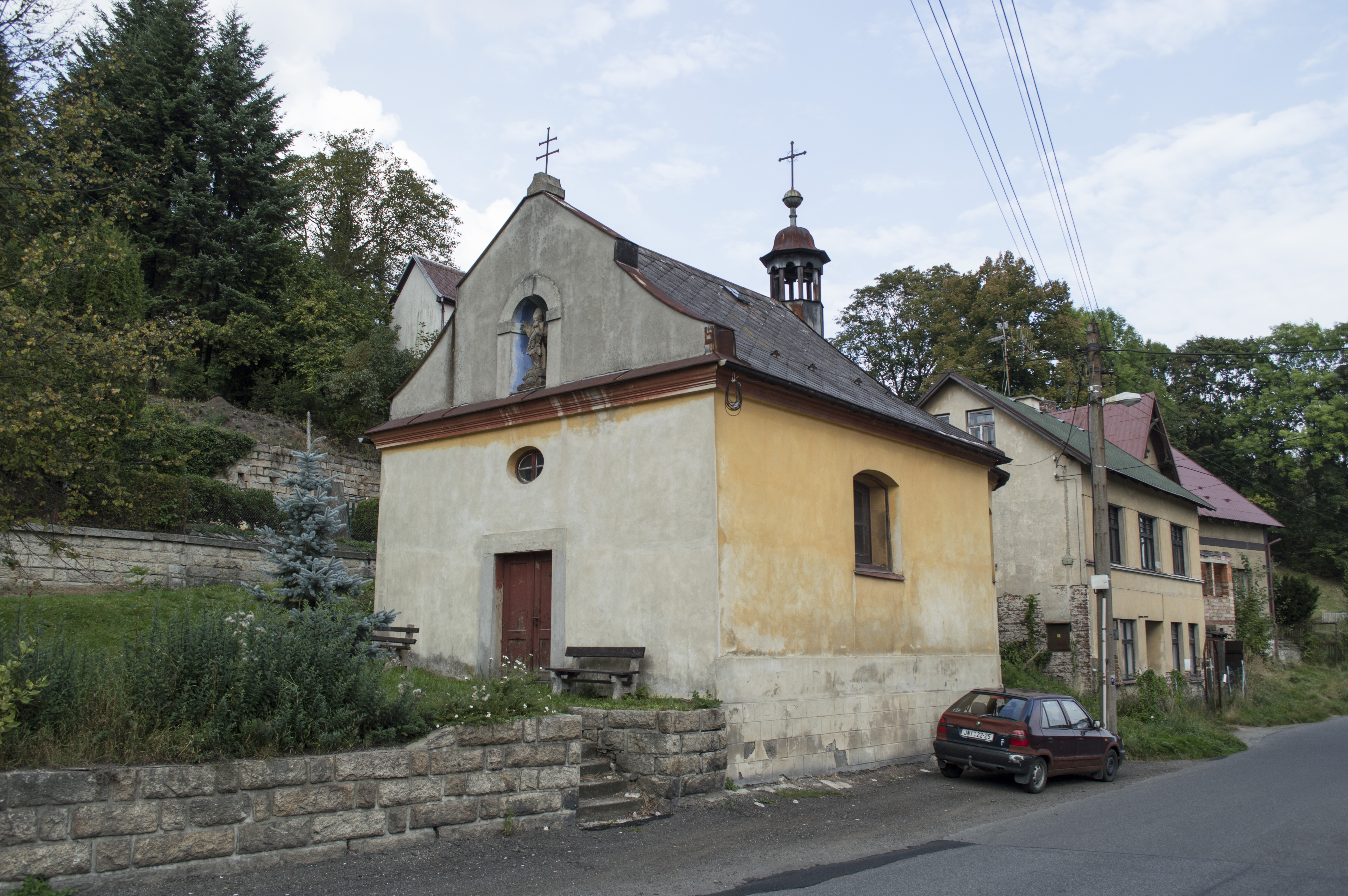 Huť u Pěnčína - kaple sv. Vojtěcha